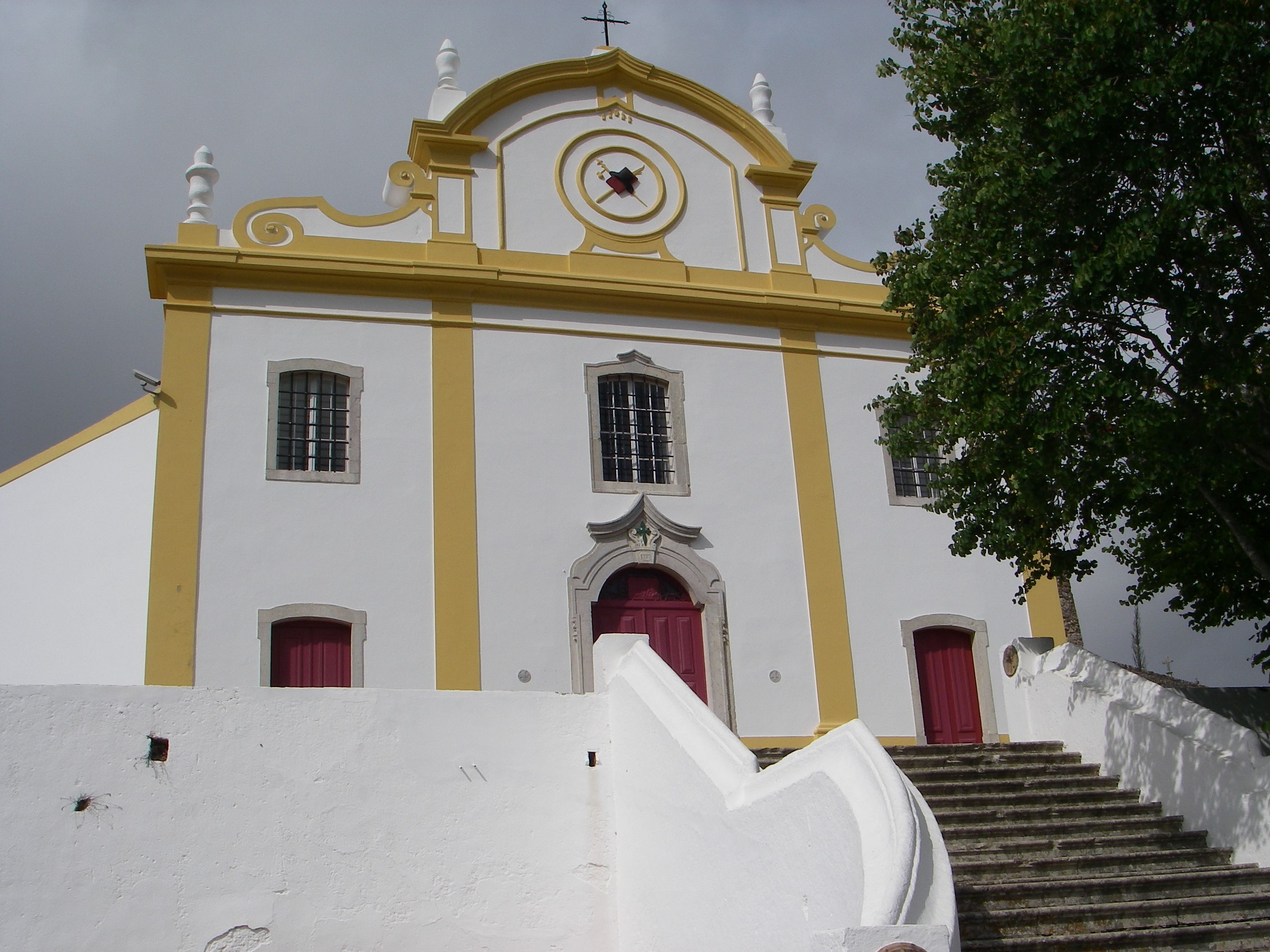 Igreja Matriz de Santiago do Cacém This file was uploaded for Wiki Loves Monuments in Portugal with the unique identifier 71154.